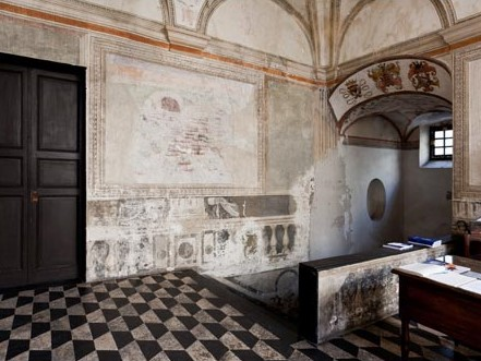 Foto del'atrio del palazzo che mostra l'affresco della flotta, la scala, parte della volta e gli stemmi